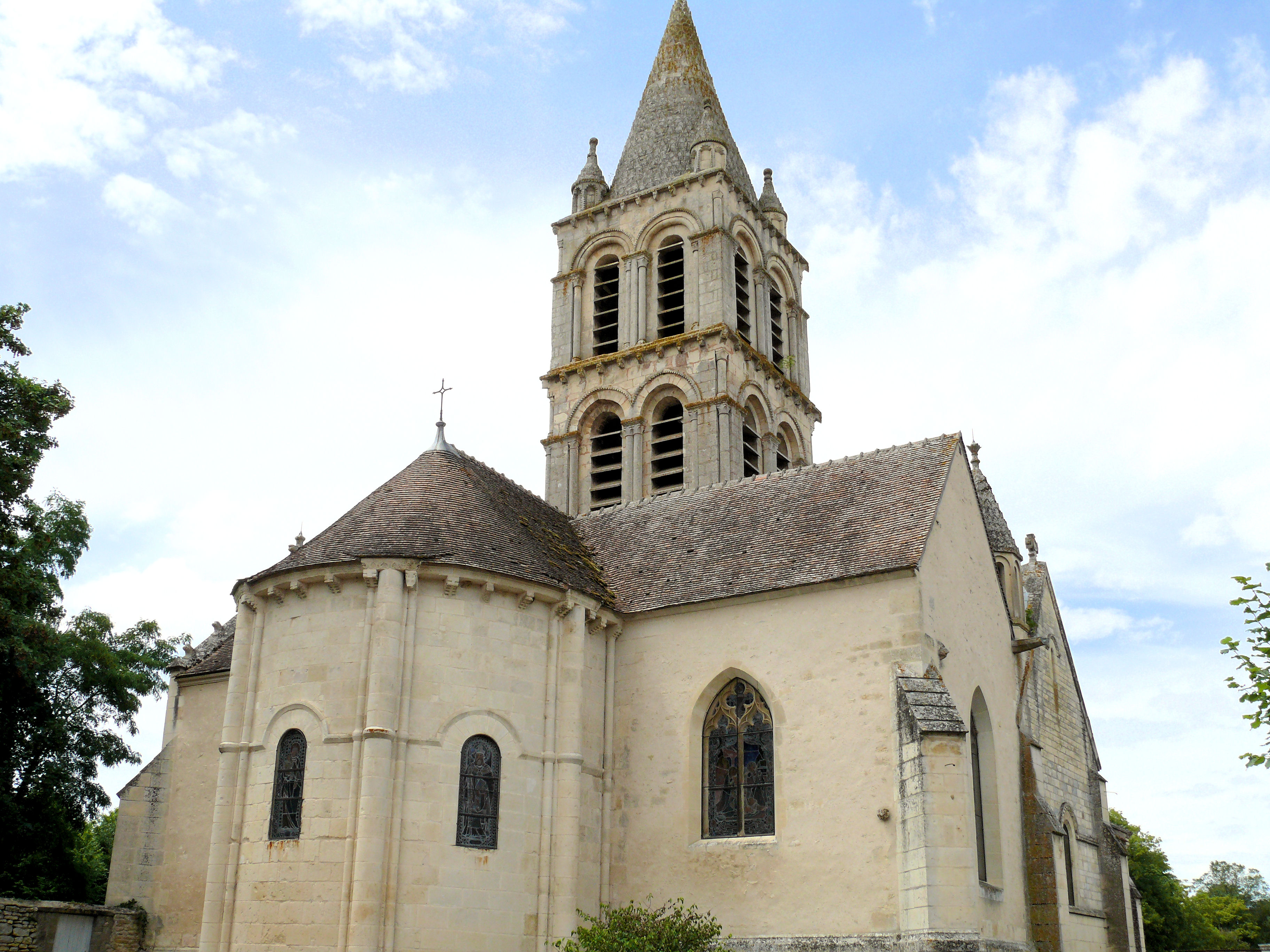 Charly - Eglise Notre-Dame - Chevet